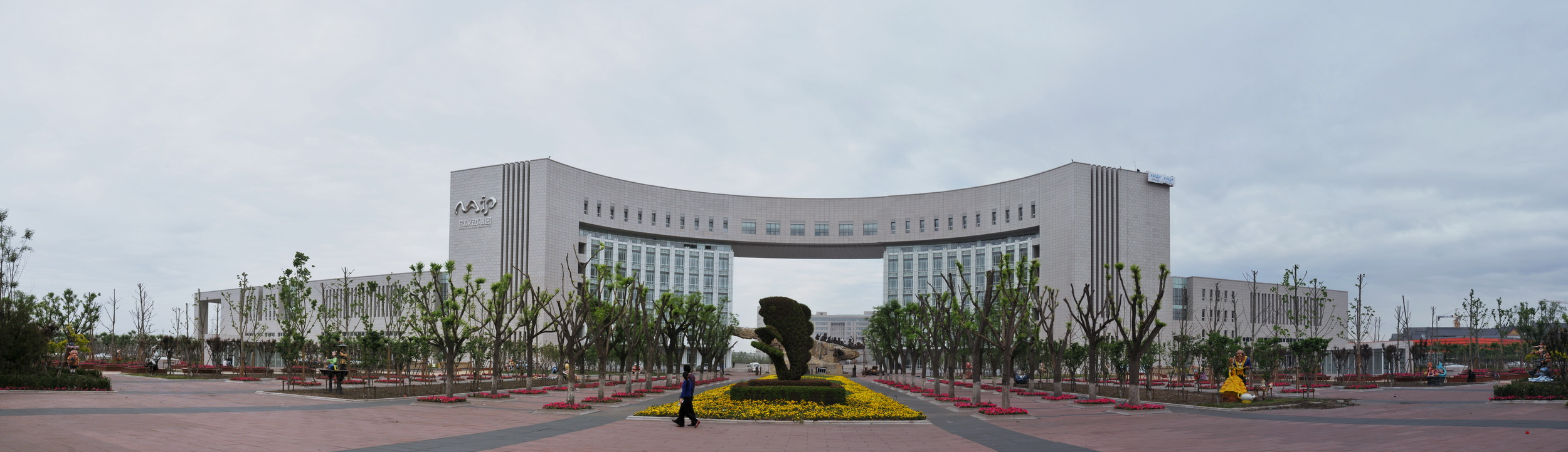 popoeye摄影并根据cc-by-sa-2.0协议分享